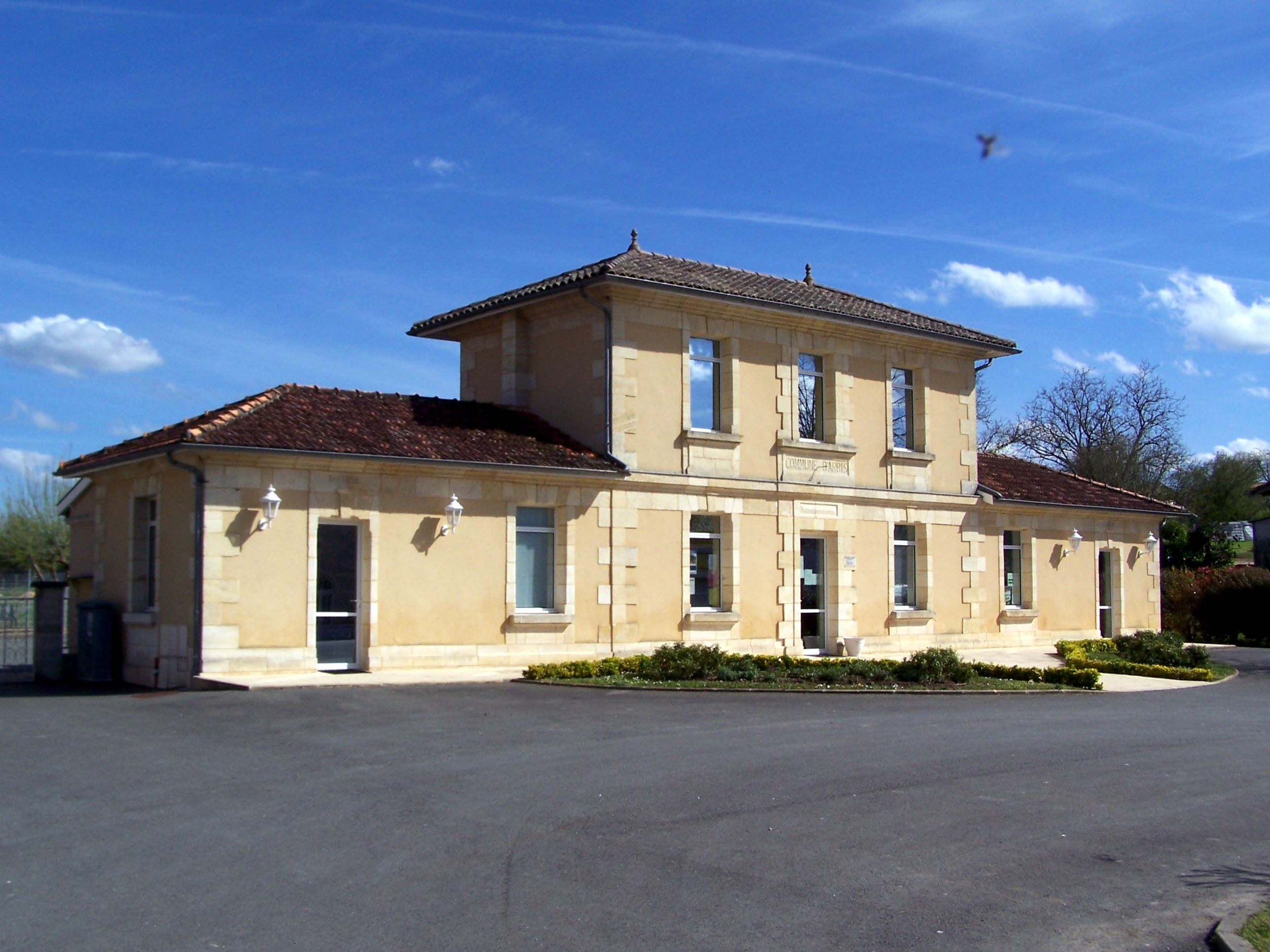 Mairie d'Arbis (Gironde, France)